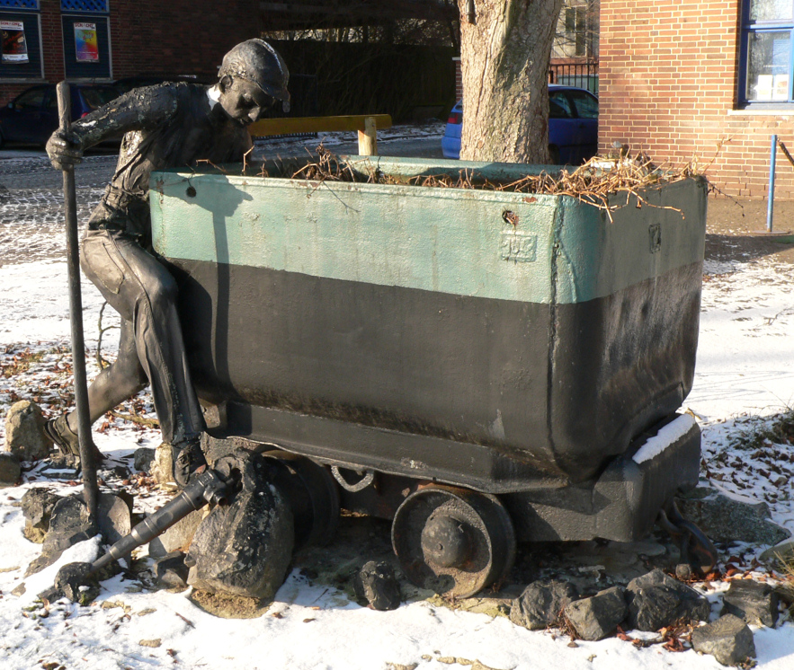 Denkmal Schacht Haverlahwiese